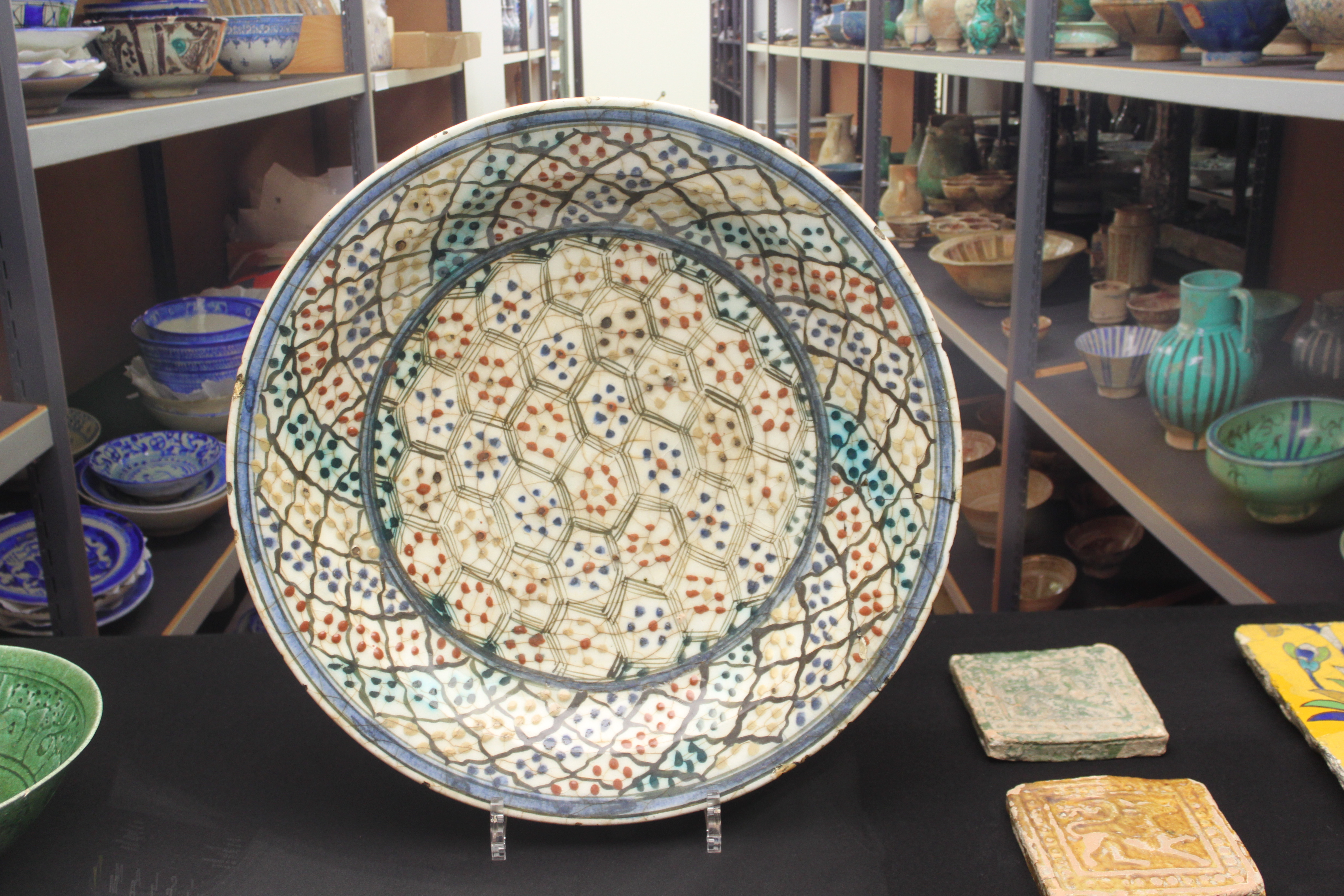 Ariana museum - Plat Iran (Tabriz ou Ispahan) - XVII ième siècle - Inventaire AR 2005-22 Pâte siliceuse, polychromie sous glaçure. Type Kubachi